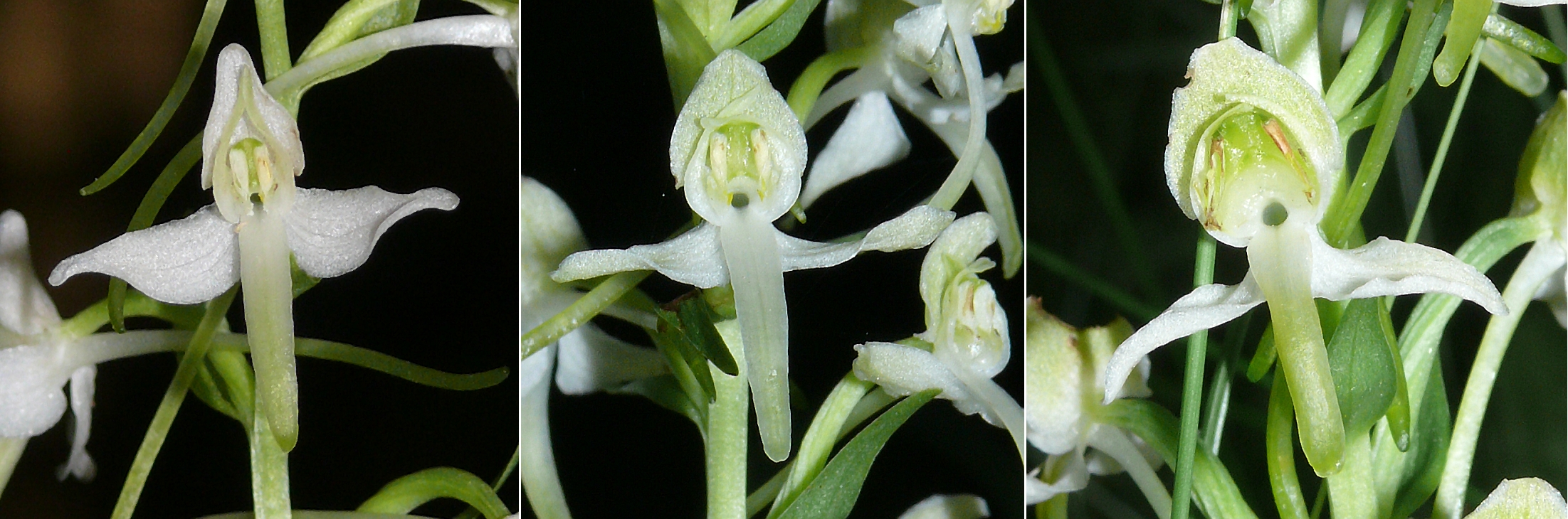 Platanthera bifolia - Pl. × hybrida - Pl. chloranthaGermany - Schwäbisch-Fränkische Waldberge